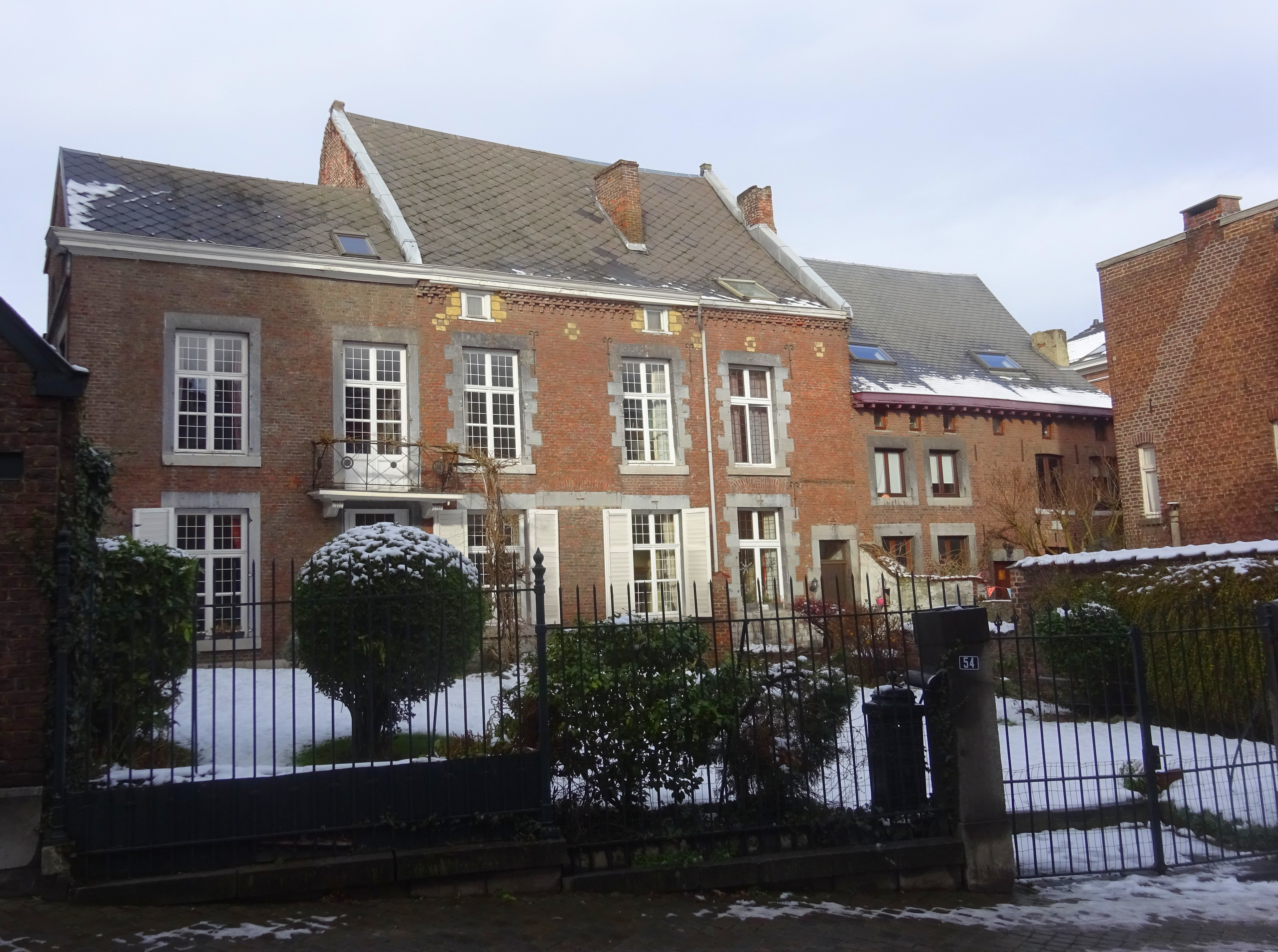 Rue de Joie, 54, Liège, maison du 17e siècle